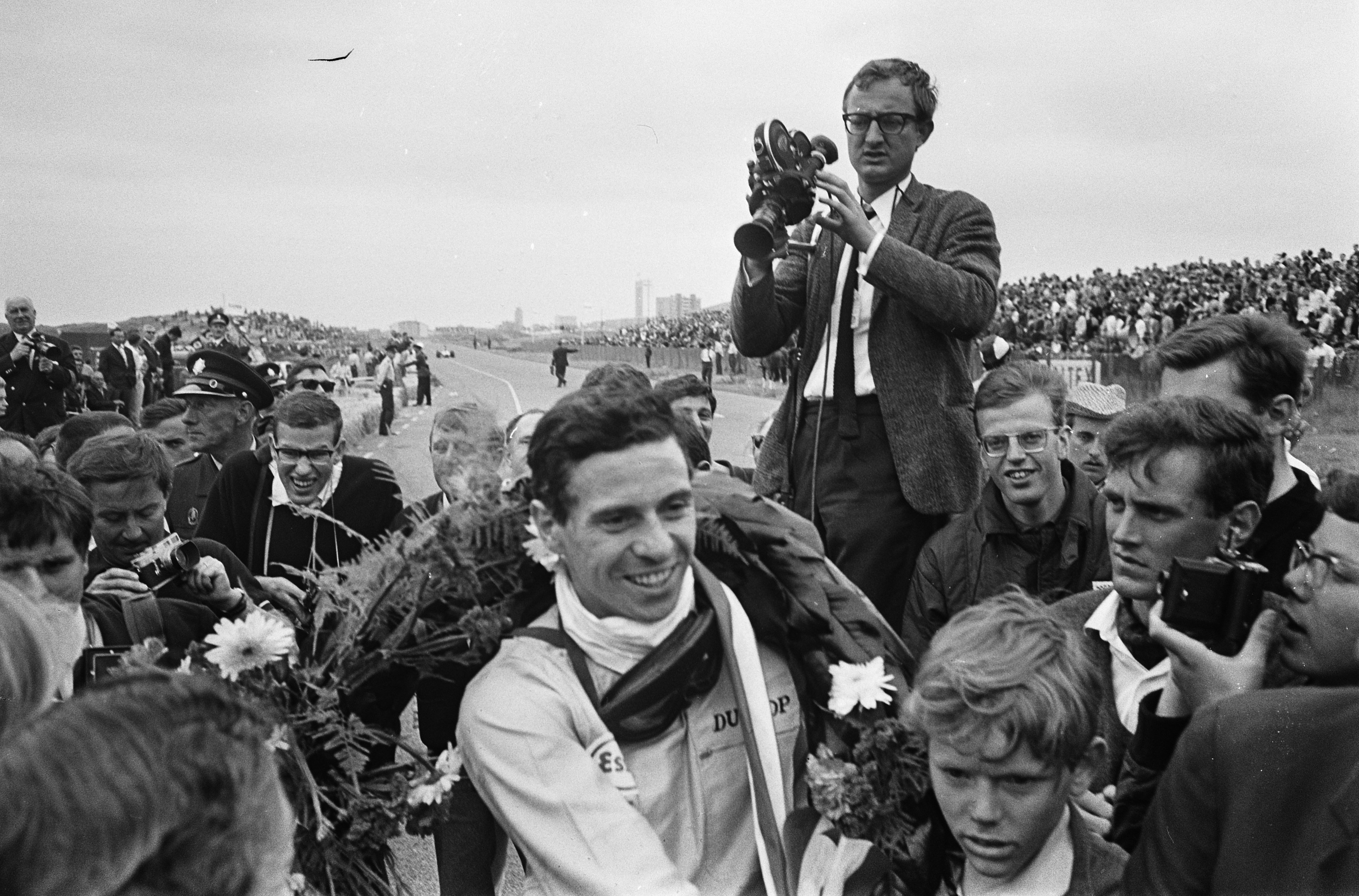 Grote Prijs van Zandvoort, na de race winnaar Jim Clark.